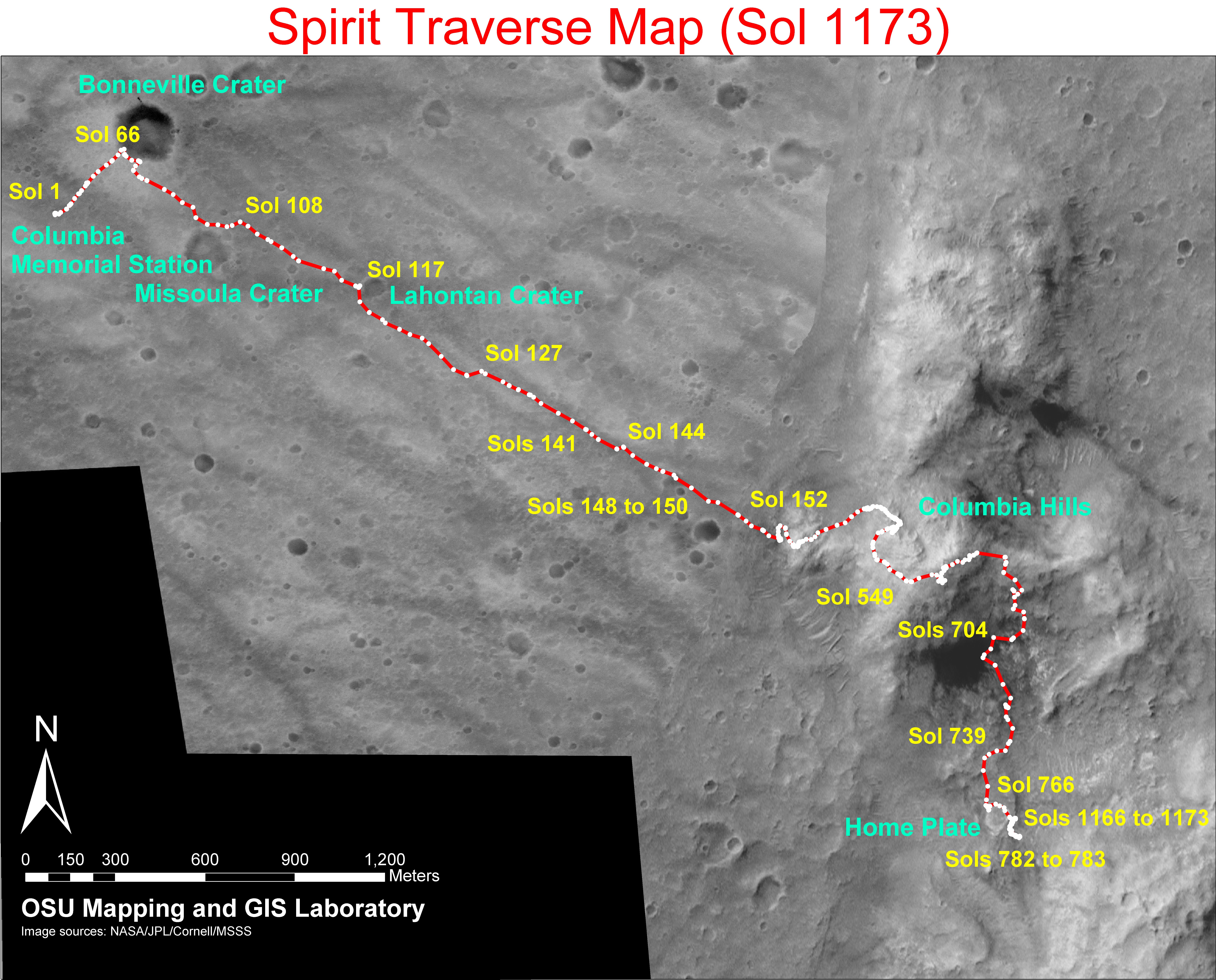 Kart vum Spirit.